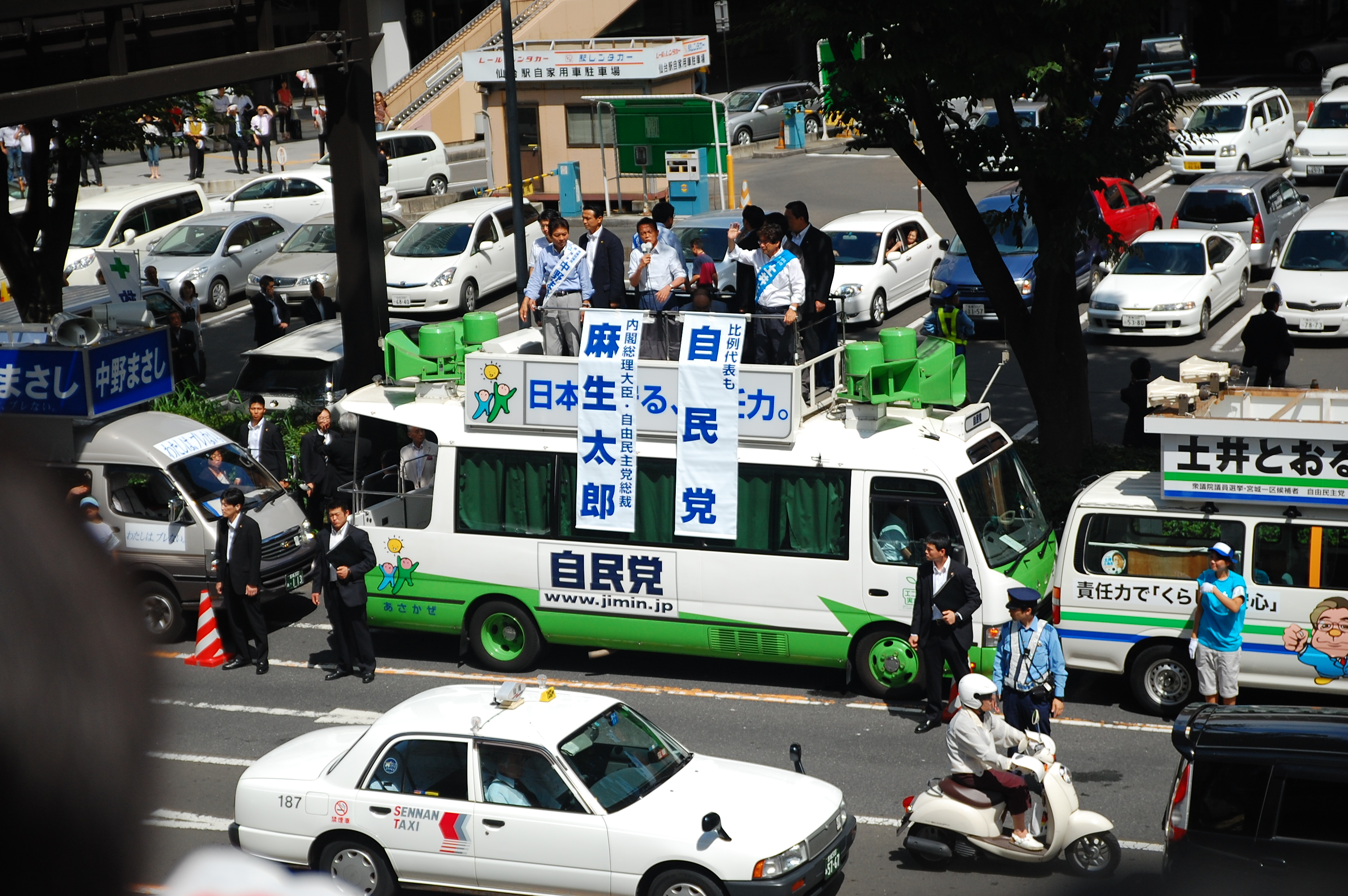 麻生さん来た